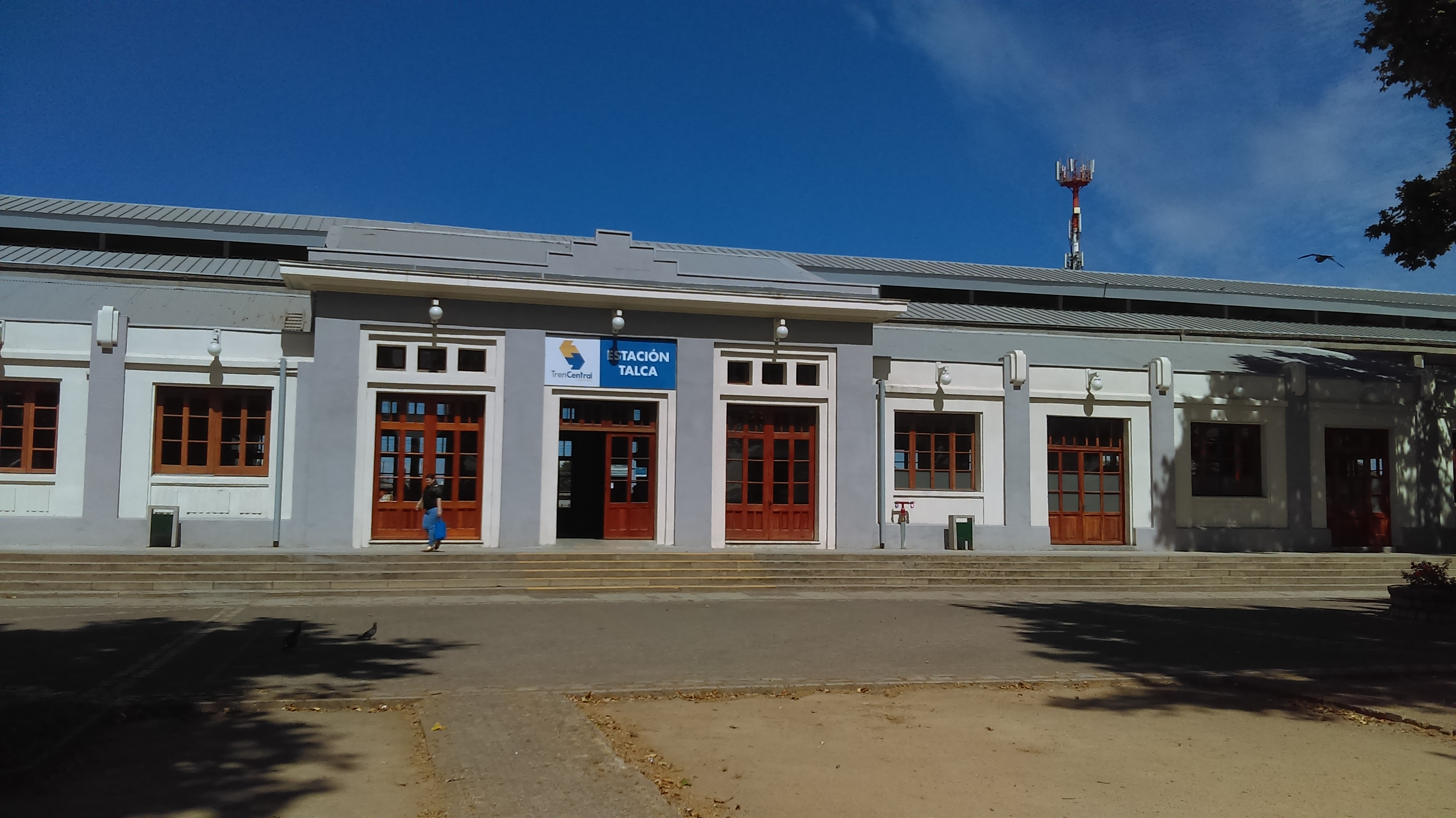 Frontis de la remodelada Estación de Trenes de Talca